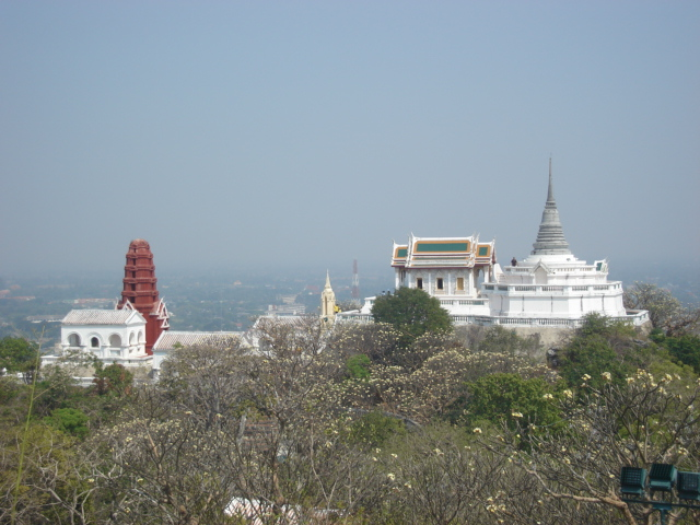 อุทยานประวัติศาสตร์พระนครคีรีKhao Wang